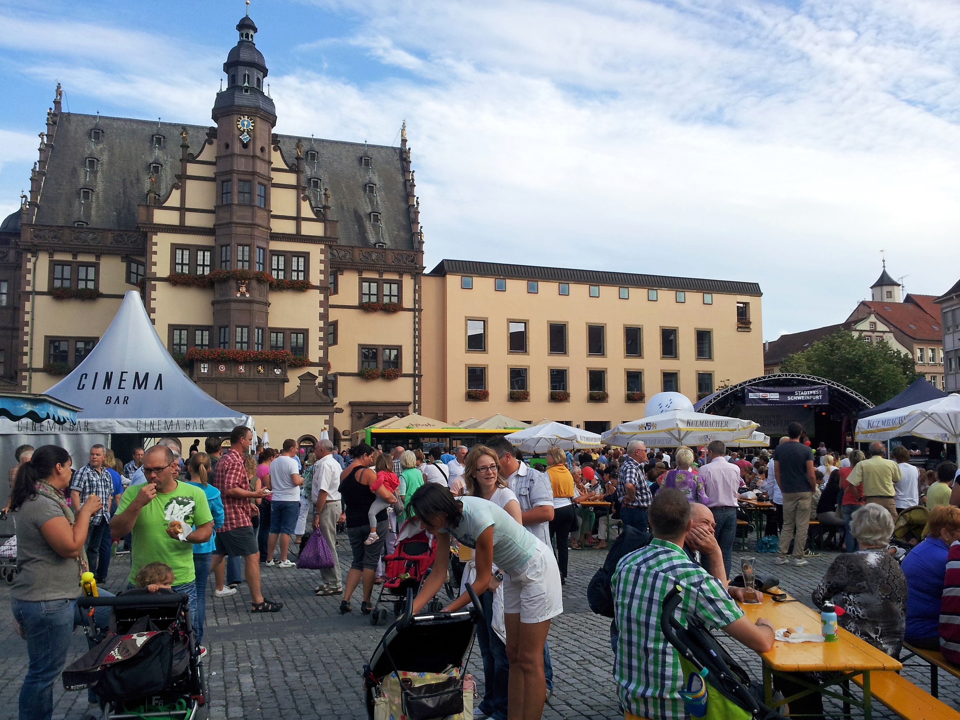 "Stadtfest" in Schweinfurt im Jahr 2012.